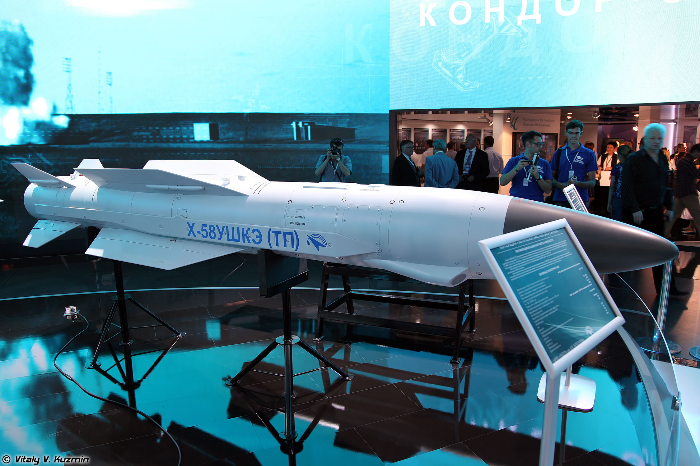 Противорадиолокационная ракета Х-58УШКЭ ТП